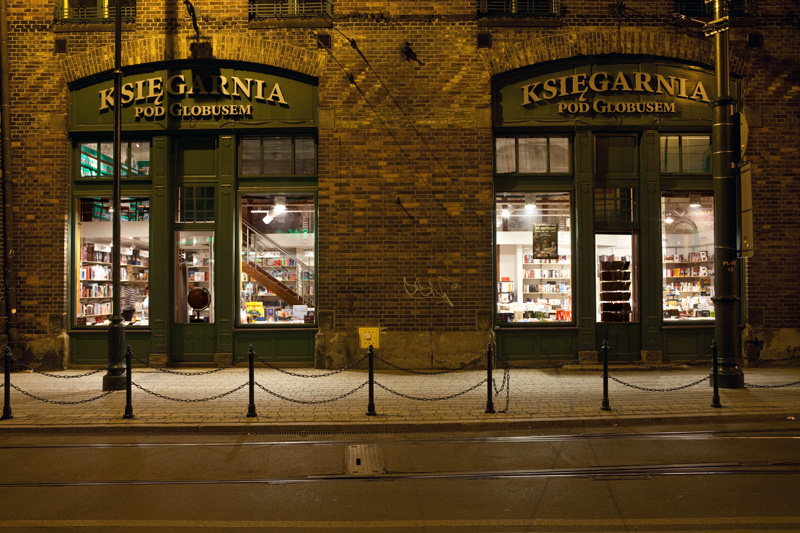 Front Księgarnia pod globusem od ulicy Długiej